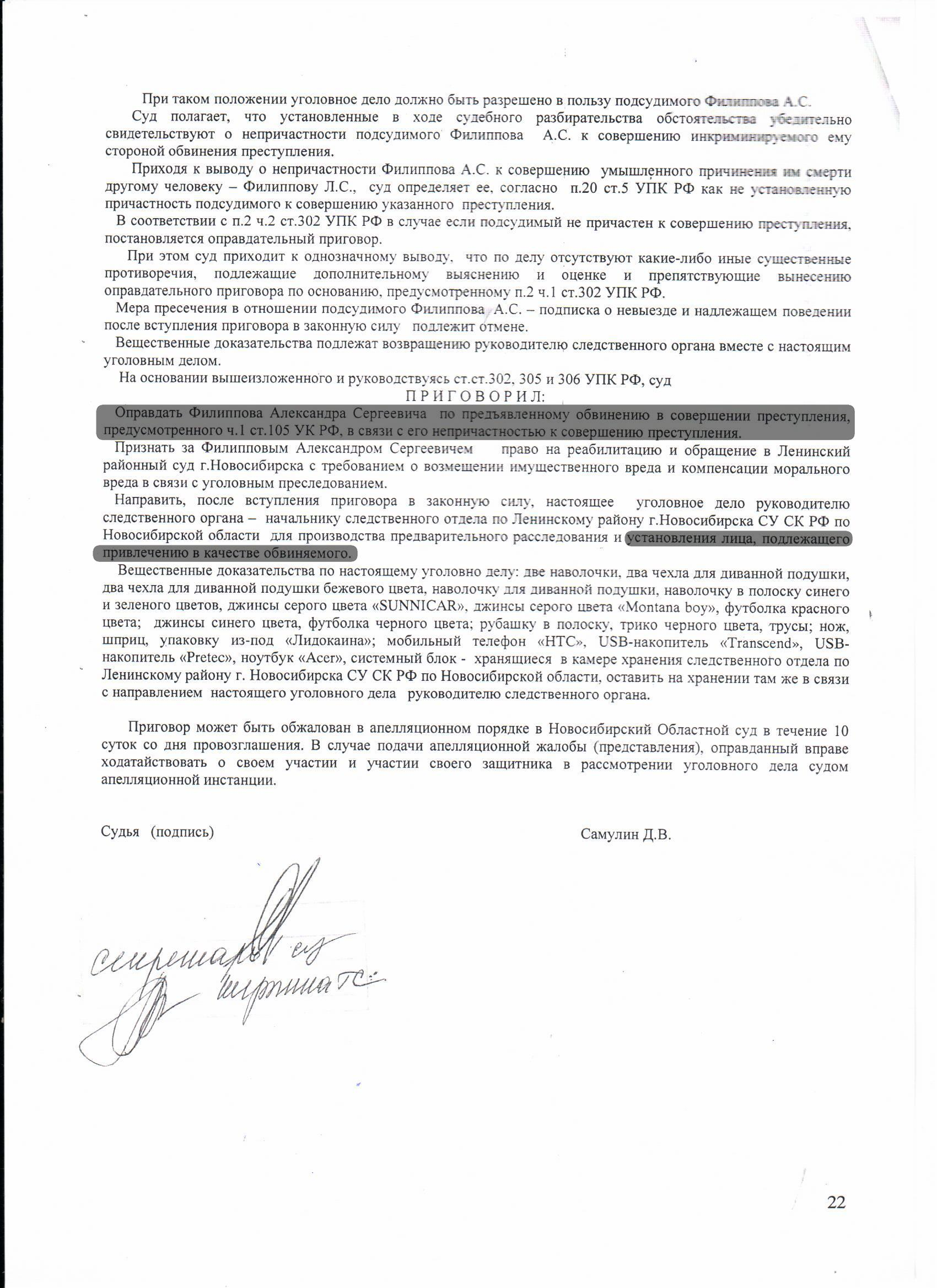 Оправдательный приговор судьи Д.В. Самулина, с. 22